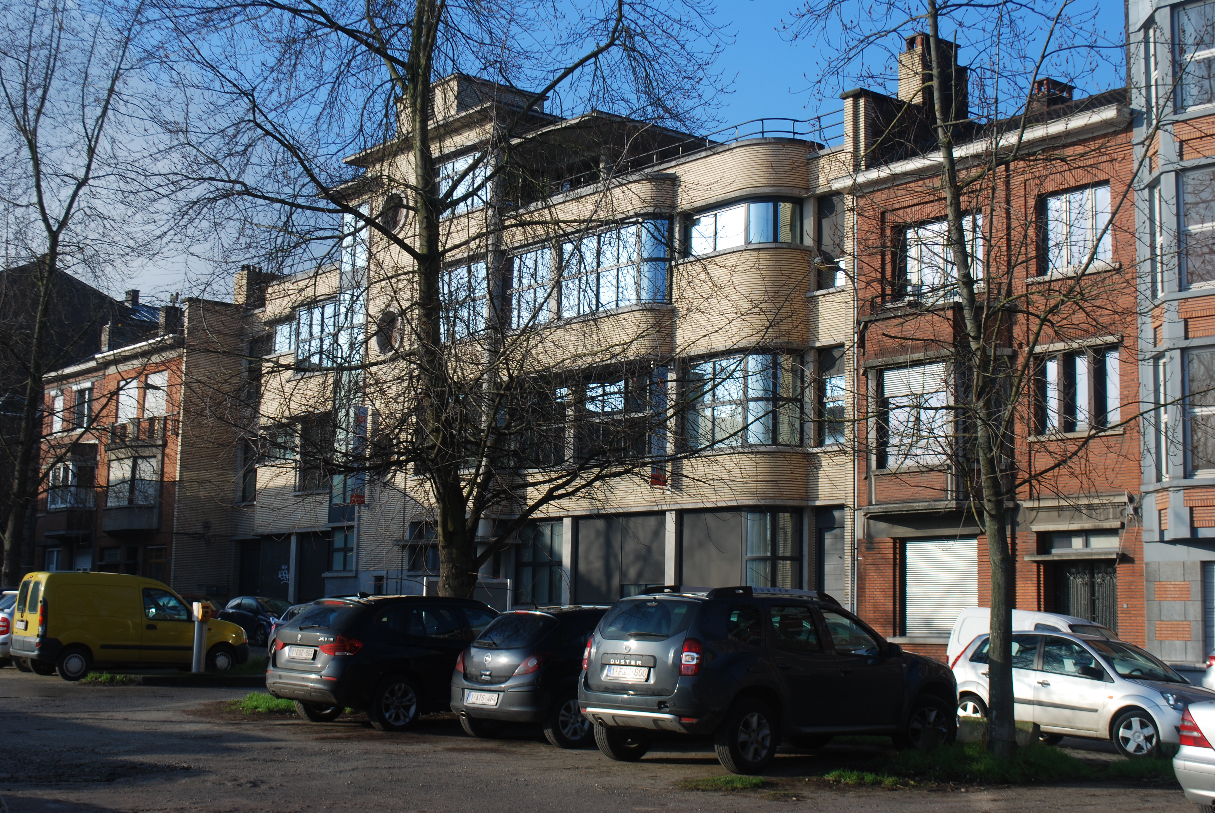 Vue du quartier de Jonfosse à Liège : l'ancien Institut chirurgical Jules Seeliger.